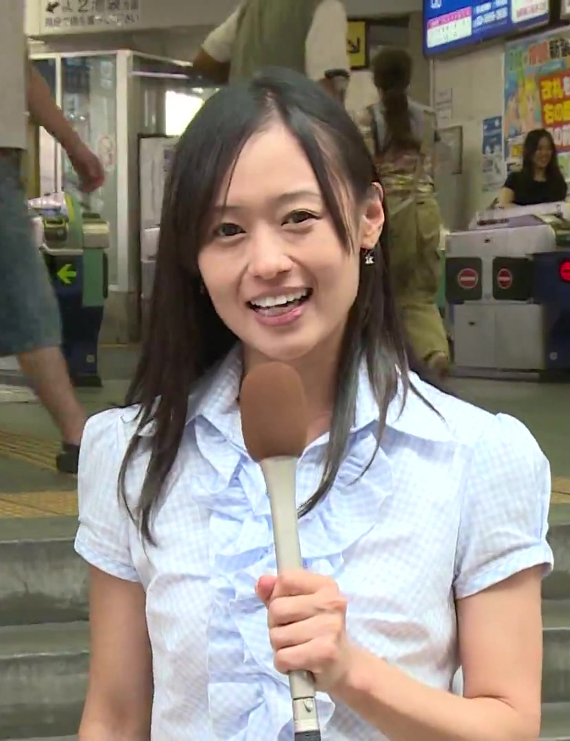 都市伝説 タワシおじさんを探せ！大山ＴＶ ＶＳ ジモトピ板橋 (柳野玲子)